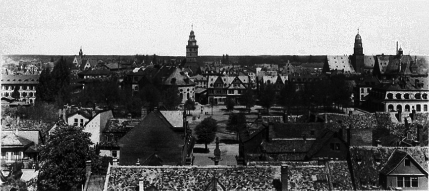 Luftbild des Paradeplatzes vom Turm des Neustädter Rathauses in Hanau nach_Norden.